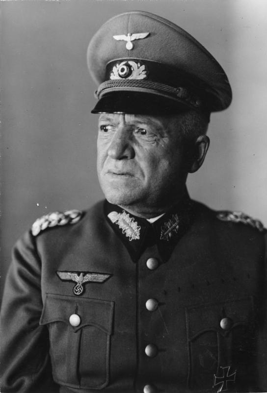 Wilhelm Adam General Adam der neue Kommandeur des Gruppenkommandos 2 (Kassel). 30.3.1938 [General Wilhelm Adam (Porträt)] Abgebildete Personen: Adam, Wilhelm: General, Heer, Kommandeur der Wehrmachtsakademie, Deutschland (GND 11600679X)